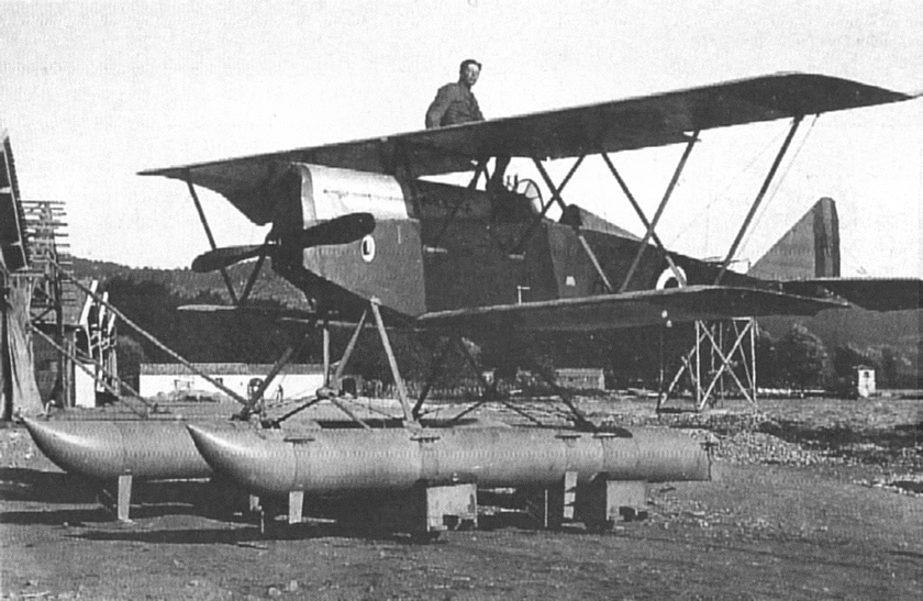 Ansaldo I S.V.A. (Floatplane version of Anlsado S.V.A.)